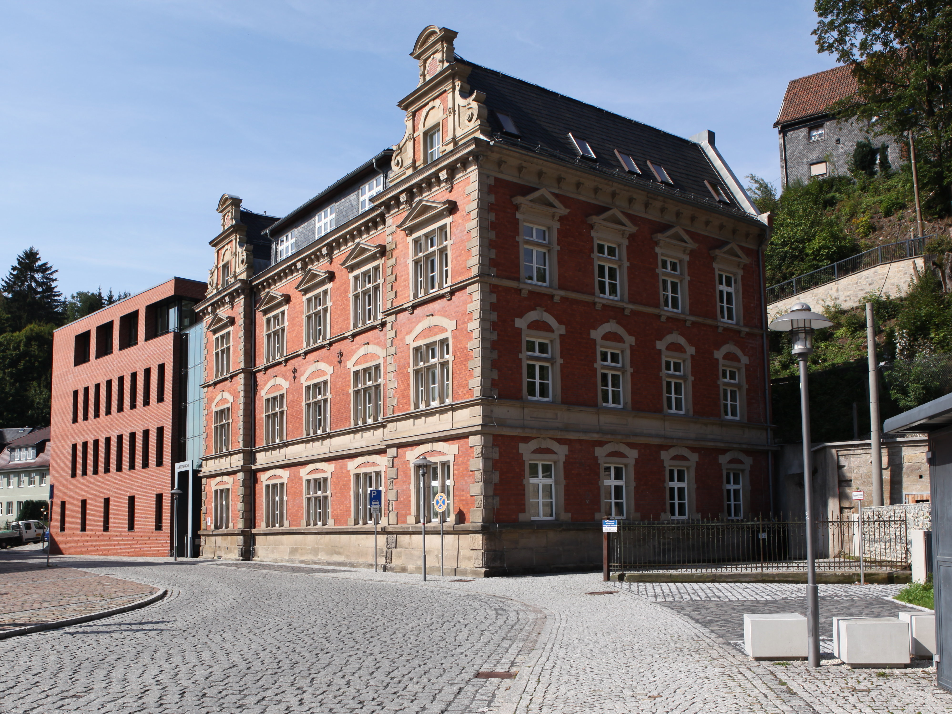 Amtsgericht, Massivbau im Neurenaissance-Stil, 1891/92 von Hermann Schubert, Sonneberg, Untere Marktstraße 2